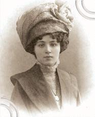 Mina Davatdarova (ca. 1895-1923)